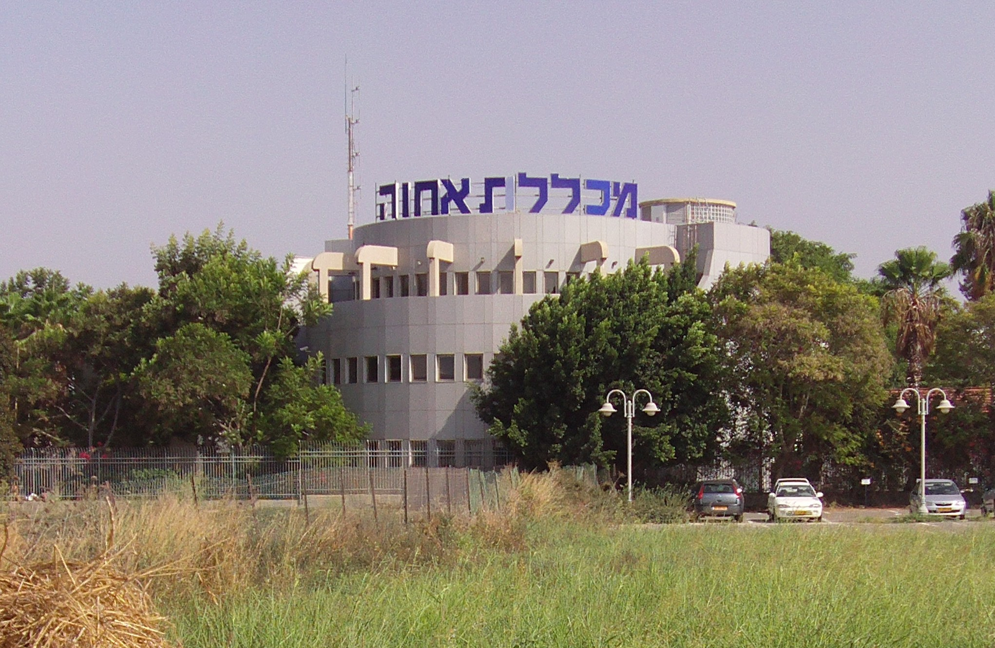 המכללה האקדמית אחוה